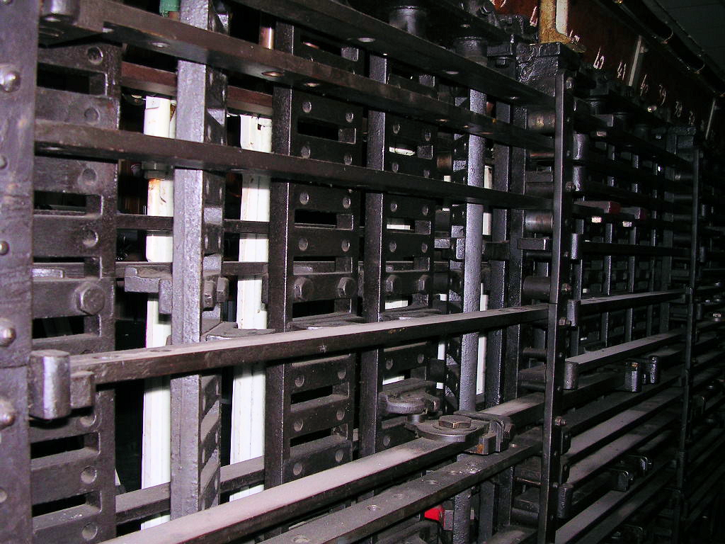 France - Ligne de Tarascon à Narbonne - Gare de Nîmes - Poste 4 de type Saxby - Table d'enclenchement